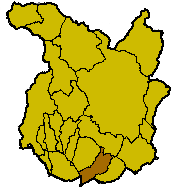 Localisation de la commune de Larciano à l'intérieur de la province de Pistoia.